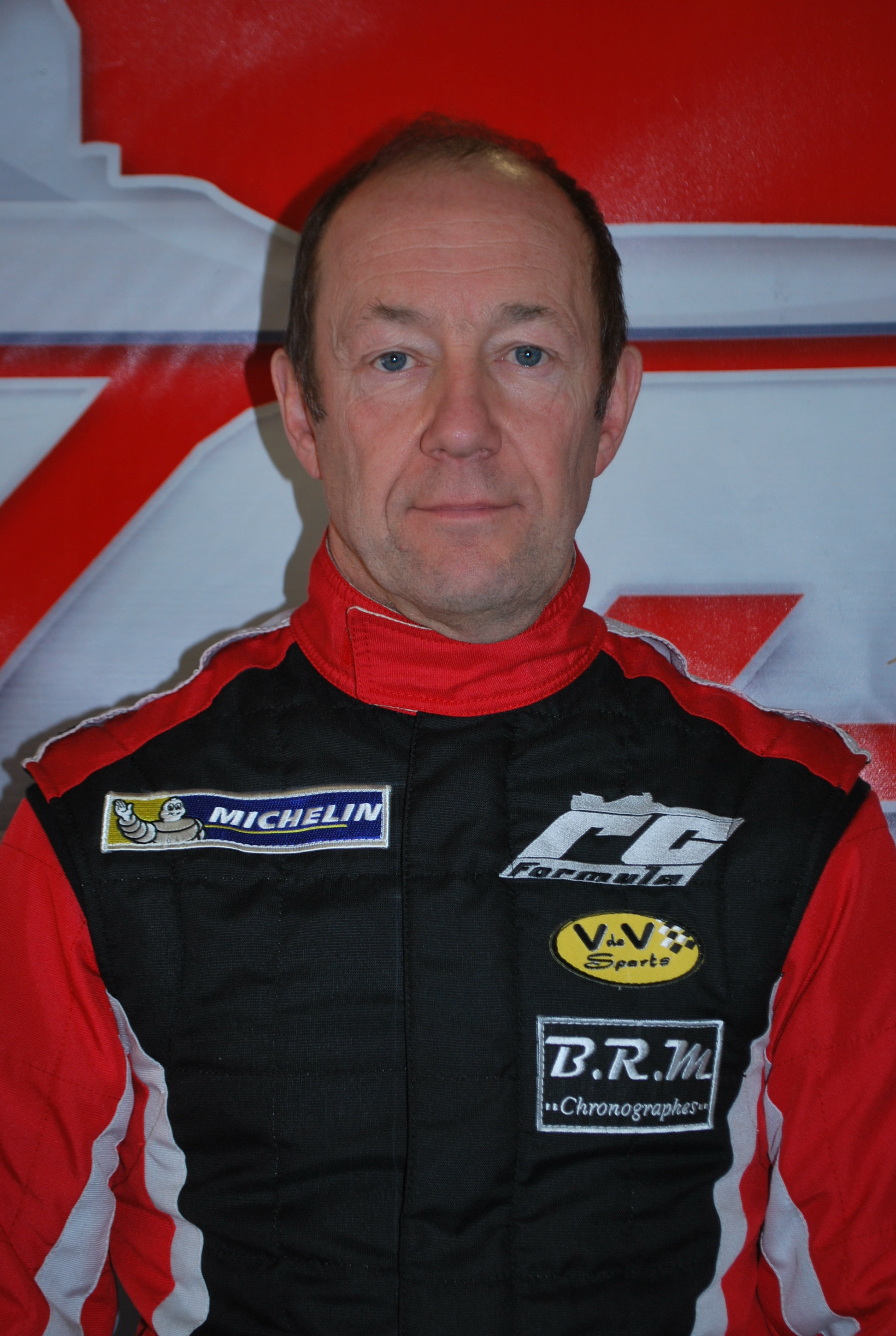 Pilote RC Formula